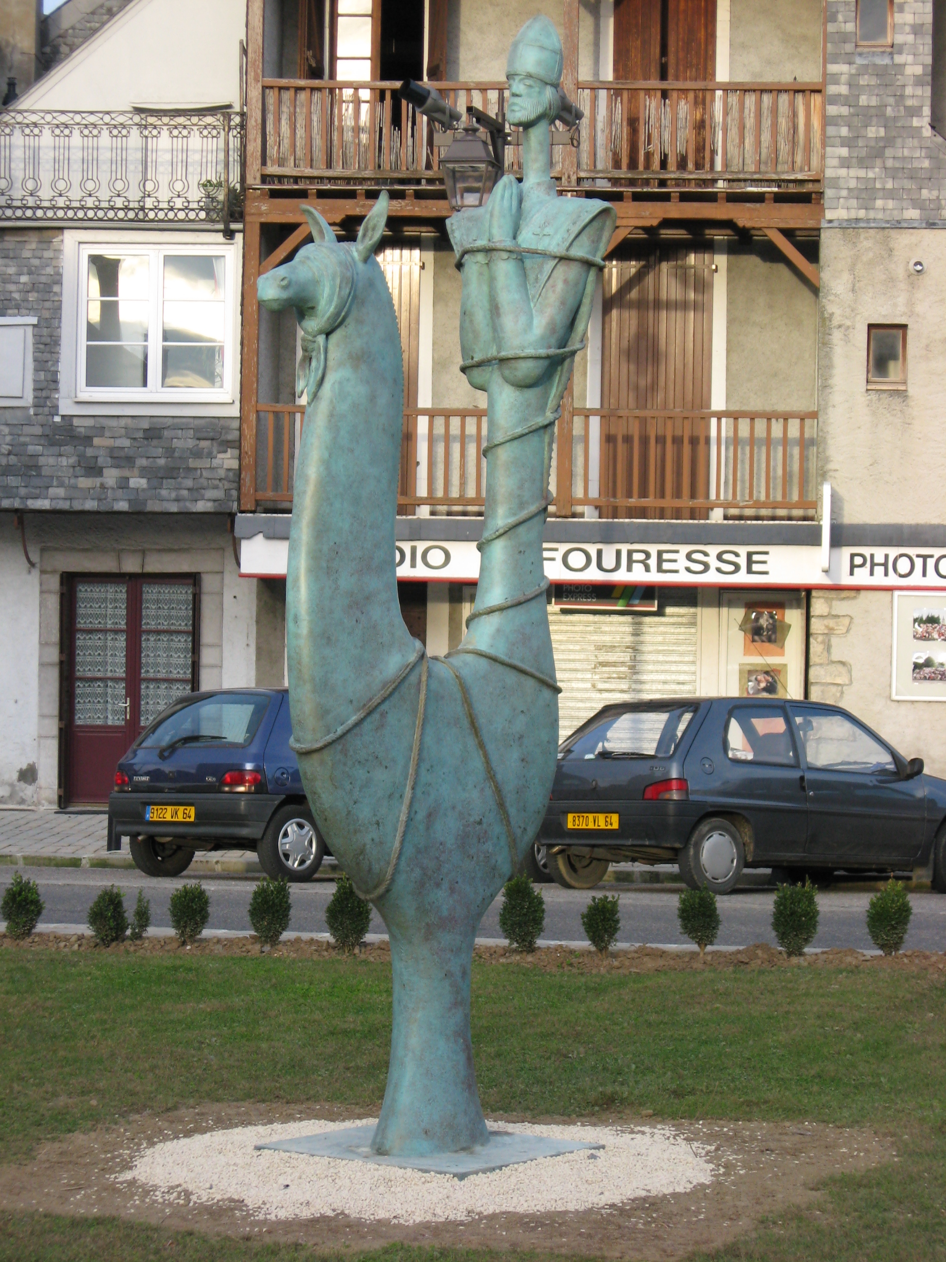 Statue de Saint Grât à Oloron sainte Marie (Pyrénées Atlantiques) Pyrénées).